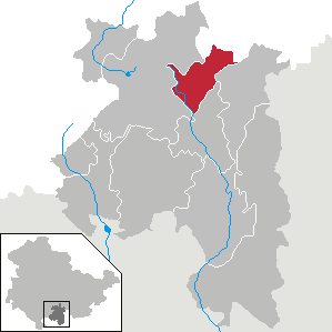 Lauscha in Thüringen, Landkreis Sonneberg